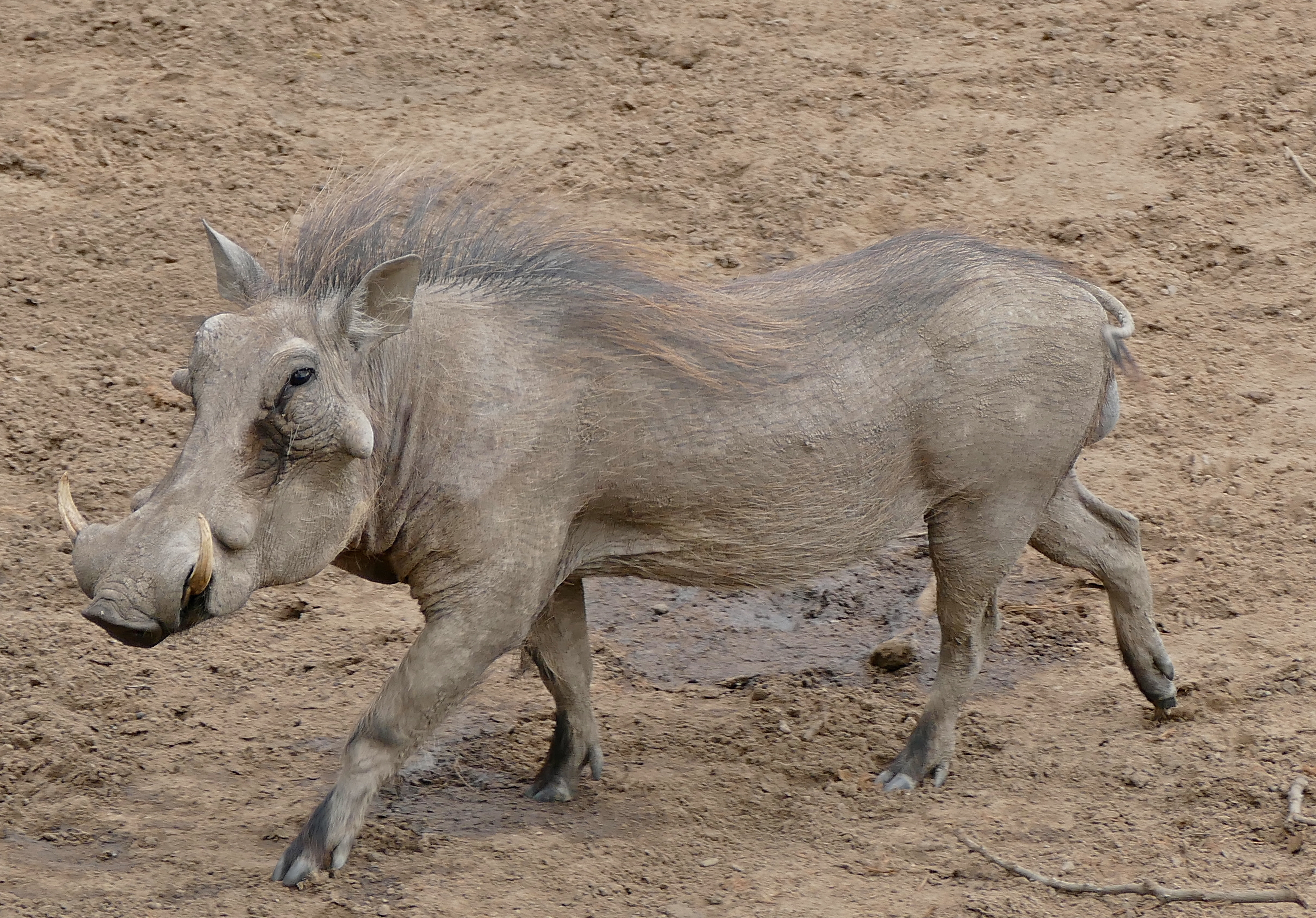 Mphafa Hide, iMfolozi Game Reserve, Hluhluwe-iMfolozi Park, Kwazulu-Natal, SOUTH AFRICA